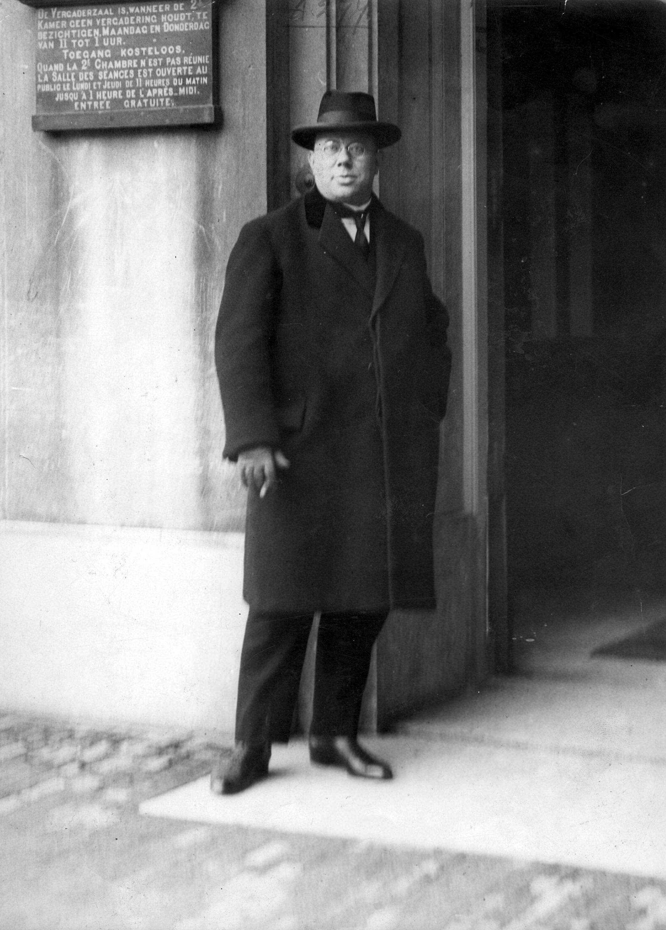 Ds. Gerrit Hendrik Kersten (met sigaret of sigaartje), Tweede Kamerlid van de Staatkundig Gereformeerde Partij (SGP). Jaar en plaats onbekend, ca 1940?